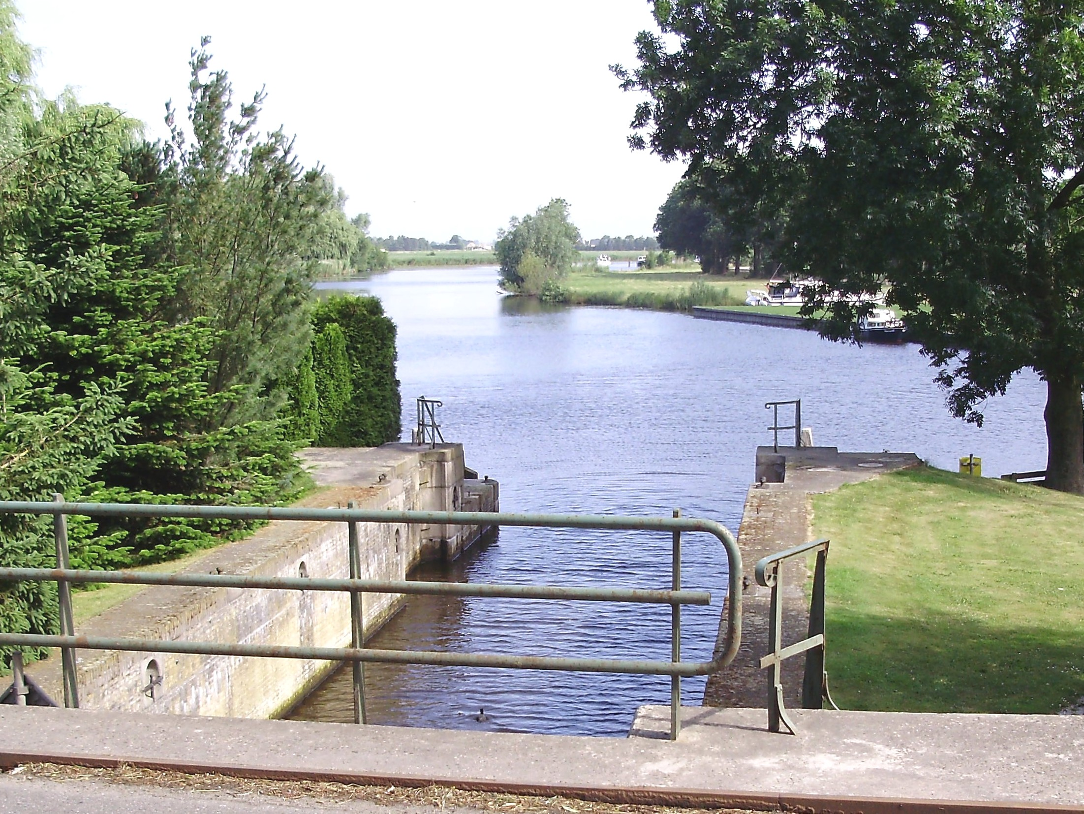 De Tjonger bij Schoterzijl, provincie Friesland, Nederland